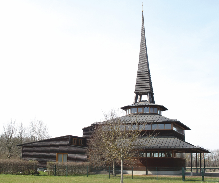 Evangelische Segenskirche in Aschheim (Oberbayern). Ansicht von Süden.